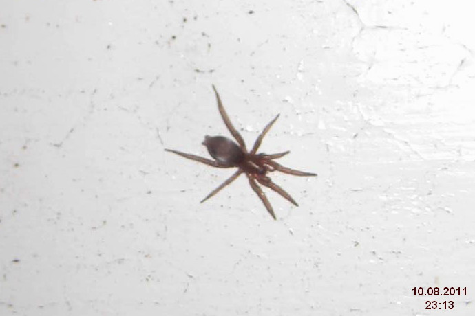 Scotophaeus blackwalli - Sardinidion blackwalli - skálovka Blackwallova - snovačka Blackwallova